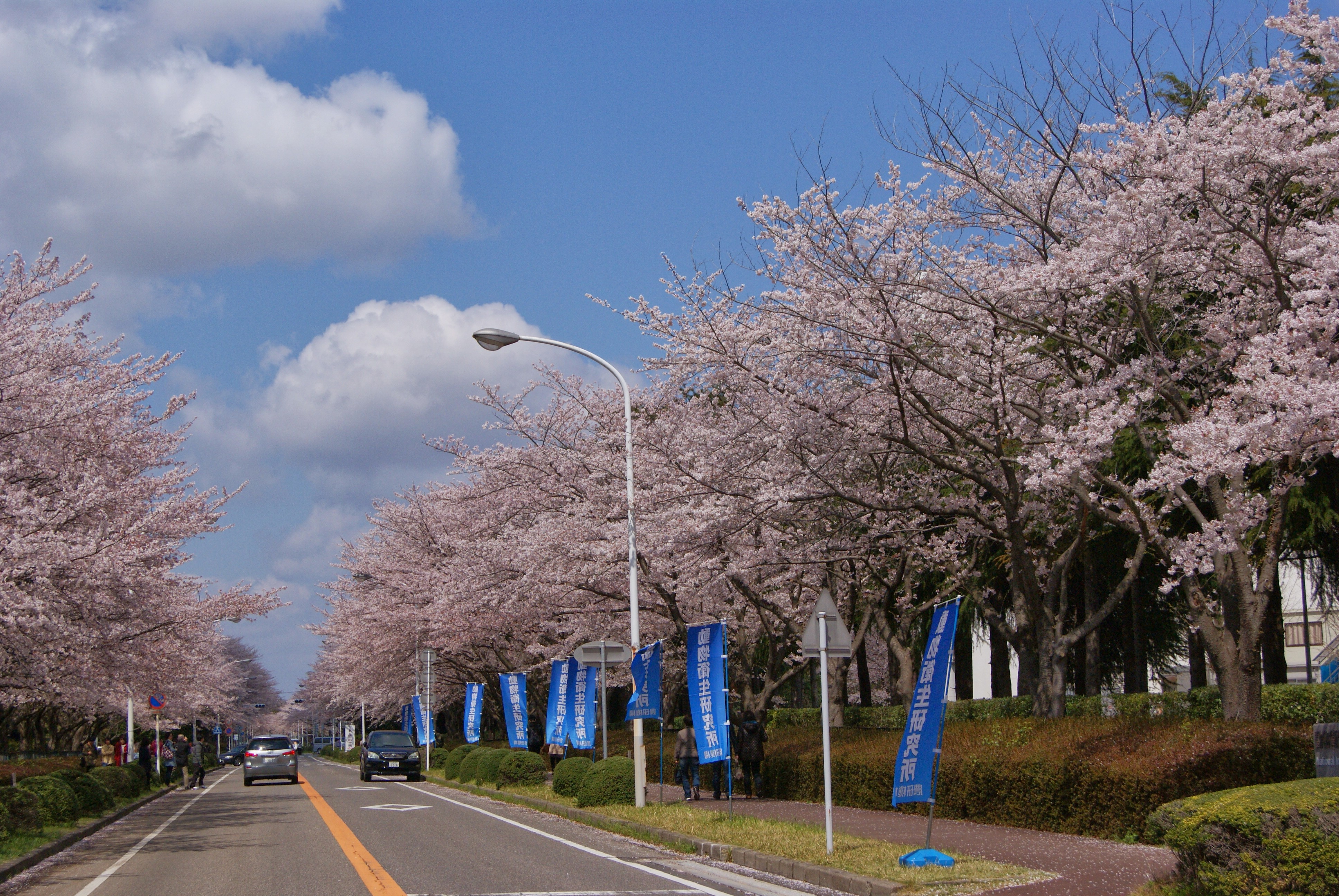 Sakura street